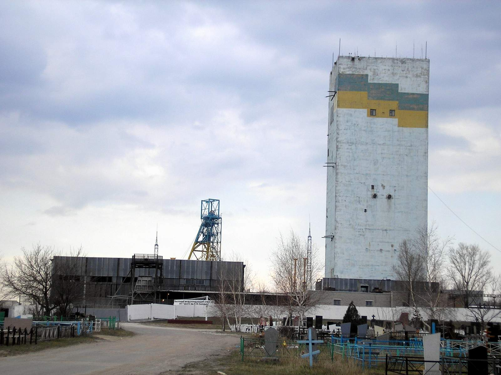 Ствол шахти ім. Засядько (м. Донецьк), який знаходиться поруч із Щегловським кладовищем.